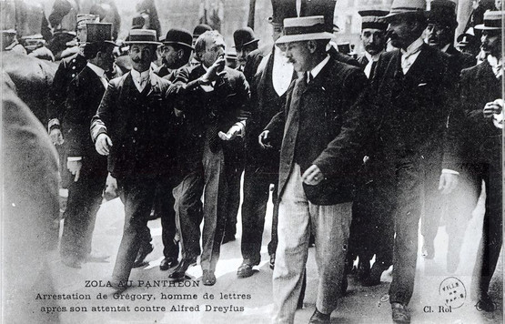 Photo de l'arrestation de Gregori - 1908